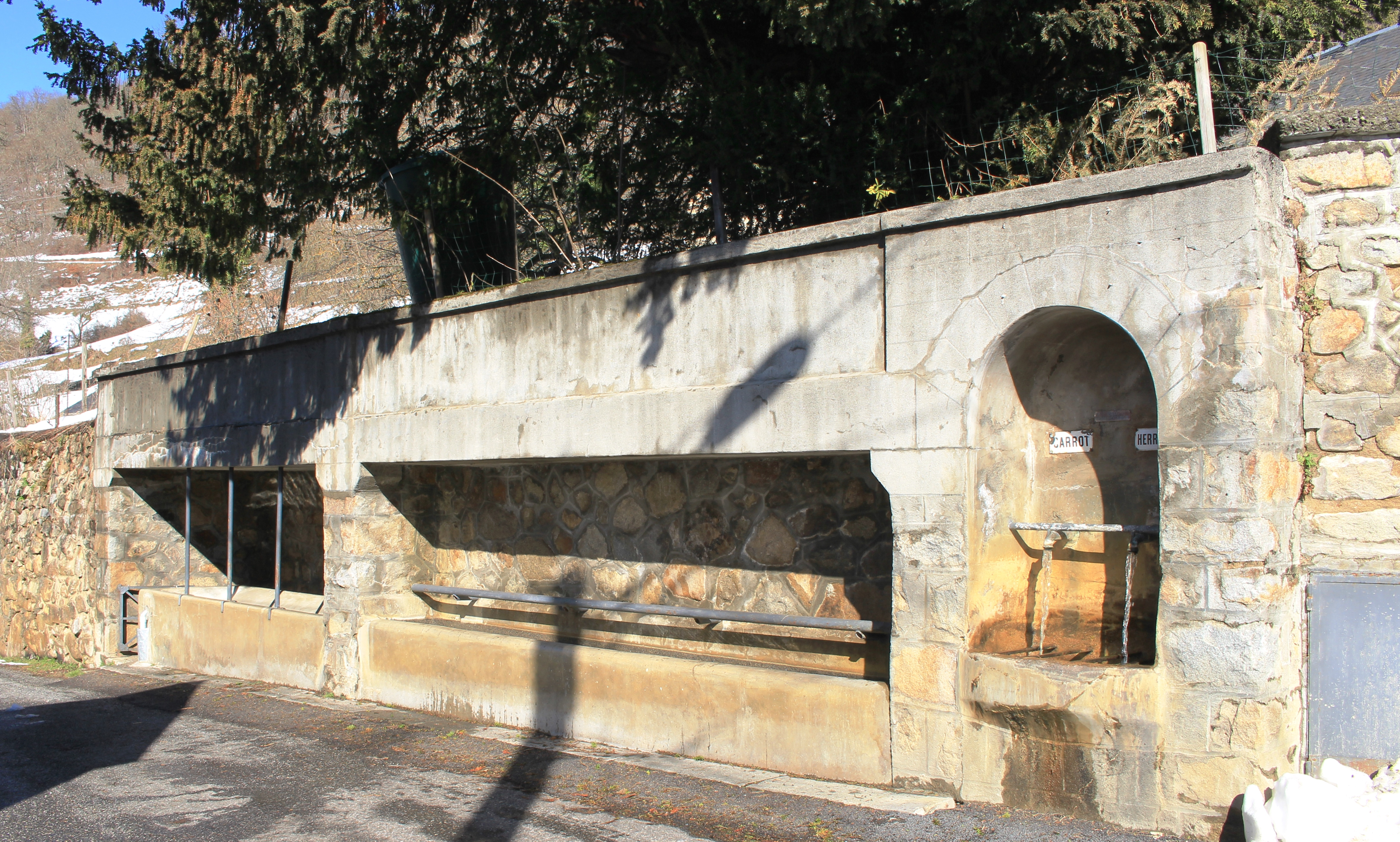 Lavoir de Cazaux-Debat (Hautes-Pyrénées)